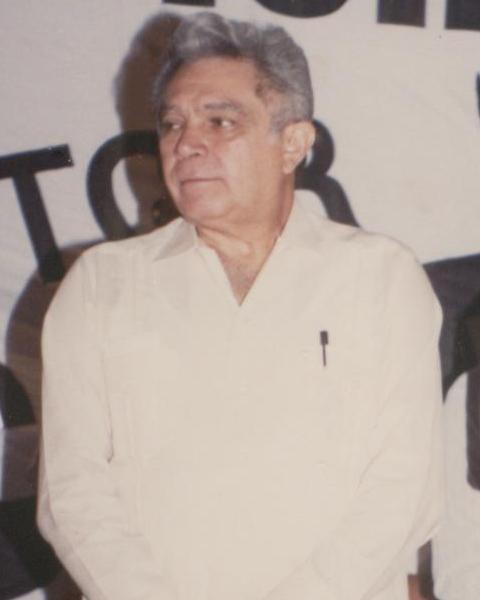 Victor Cervera Pacheco, Gobernador de Yucatan